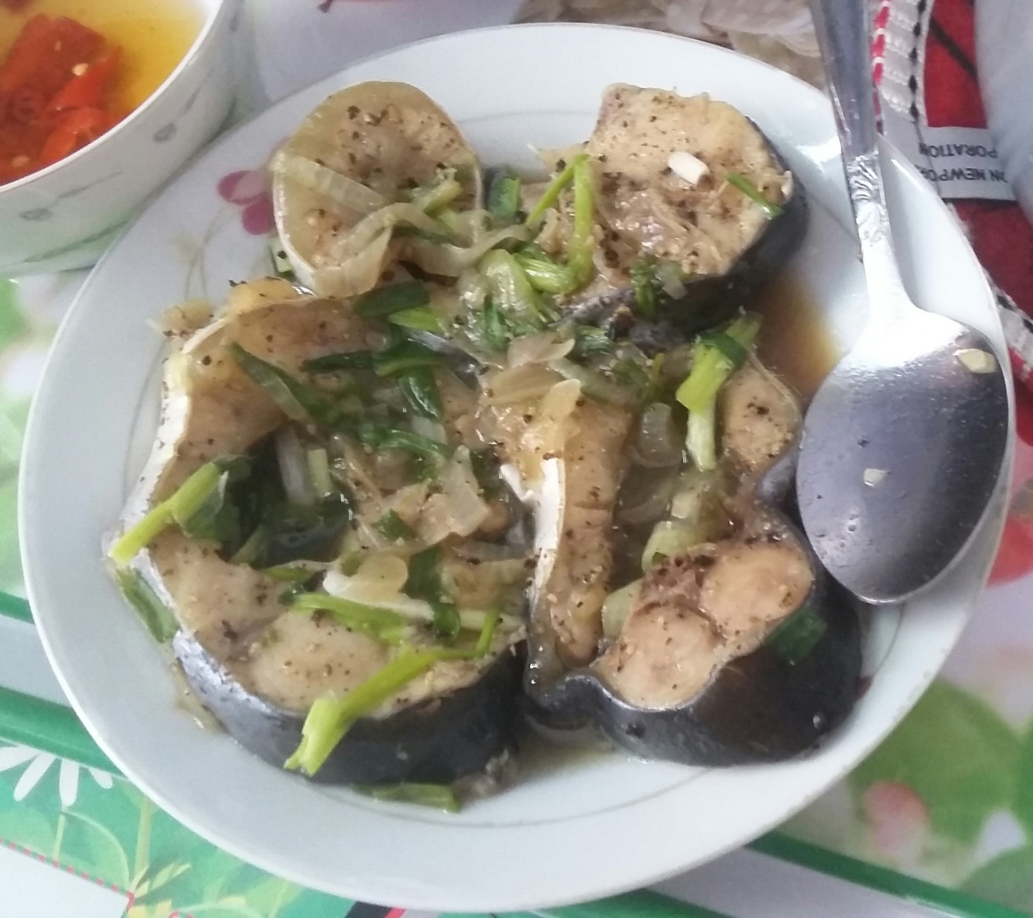 Một dĩa cá hú kho, hình tự chụp bằng máy ảnh cá nhân rồi up lên để minh họa cho bài viết